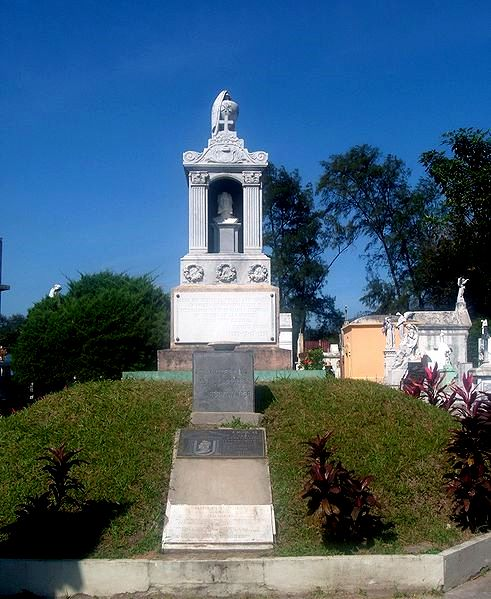 Francisco Morazan's mausoleum at cementerio de los Ilustres in San Salvador, El Salvador.